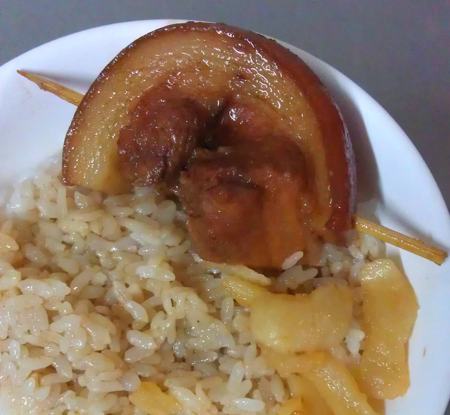 中文（台灣）: 彰化爌肉販